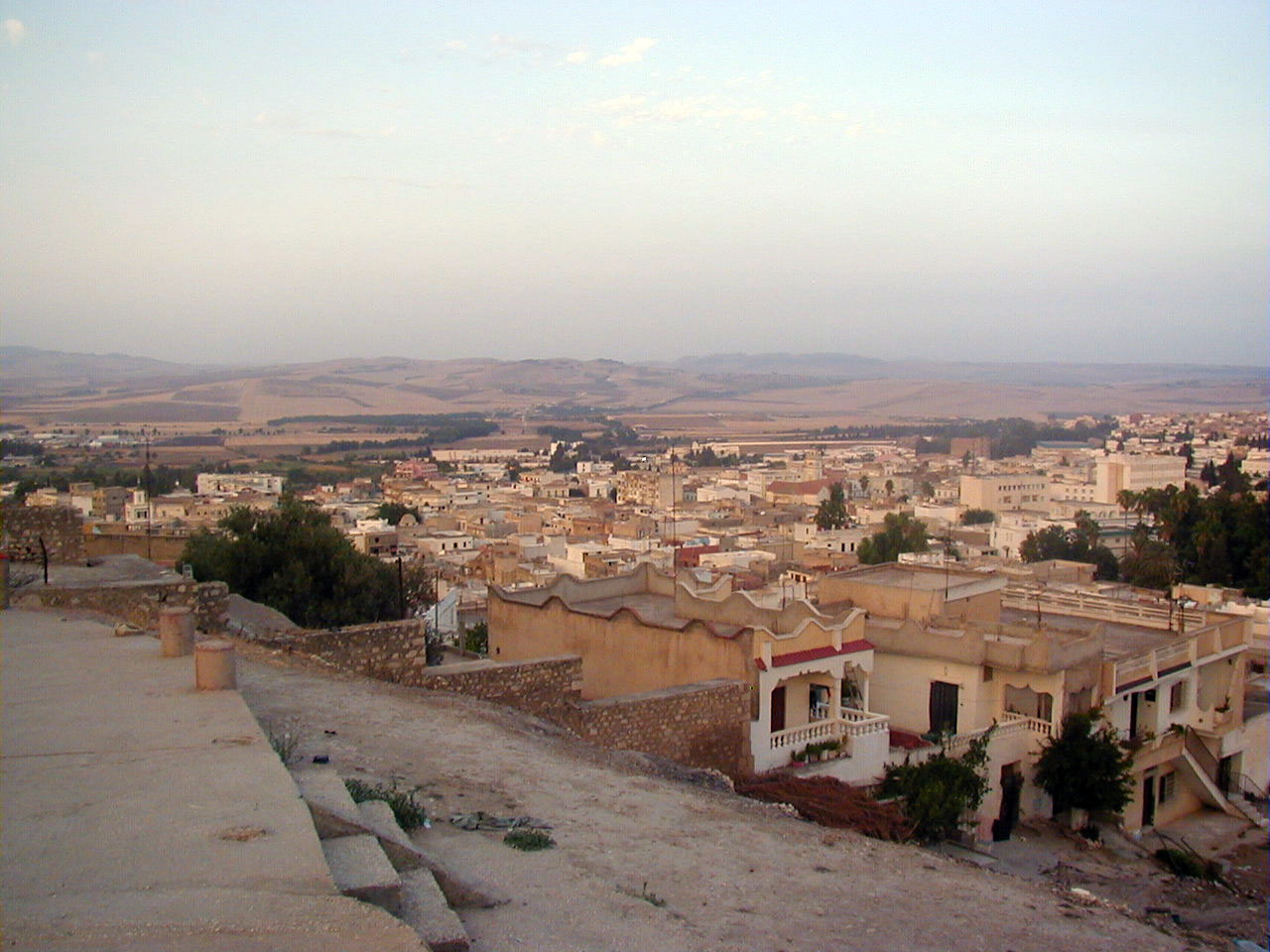 Panorama sur la ville de Béja